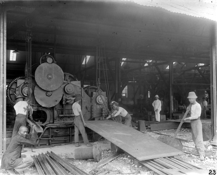 Negatief. Metaalplaten worden door werknemers bewerkt in een machine. Met op de achtergrond een man in het wit die op de werknemers toe ziet.. Interieur van de smederij van de Sabang Maatschappij